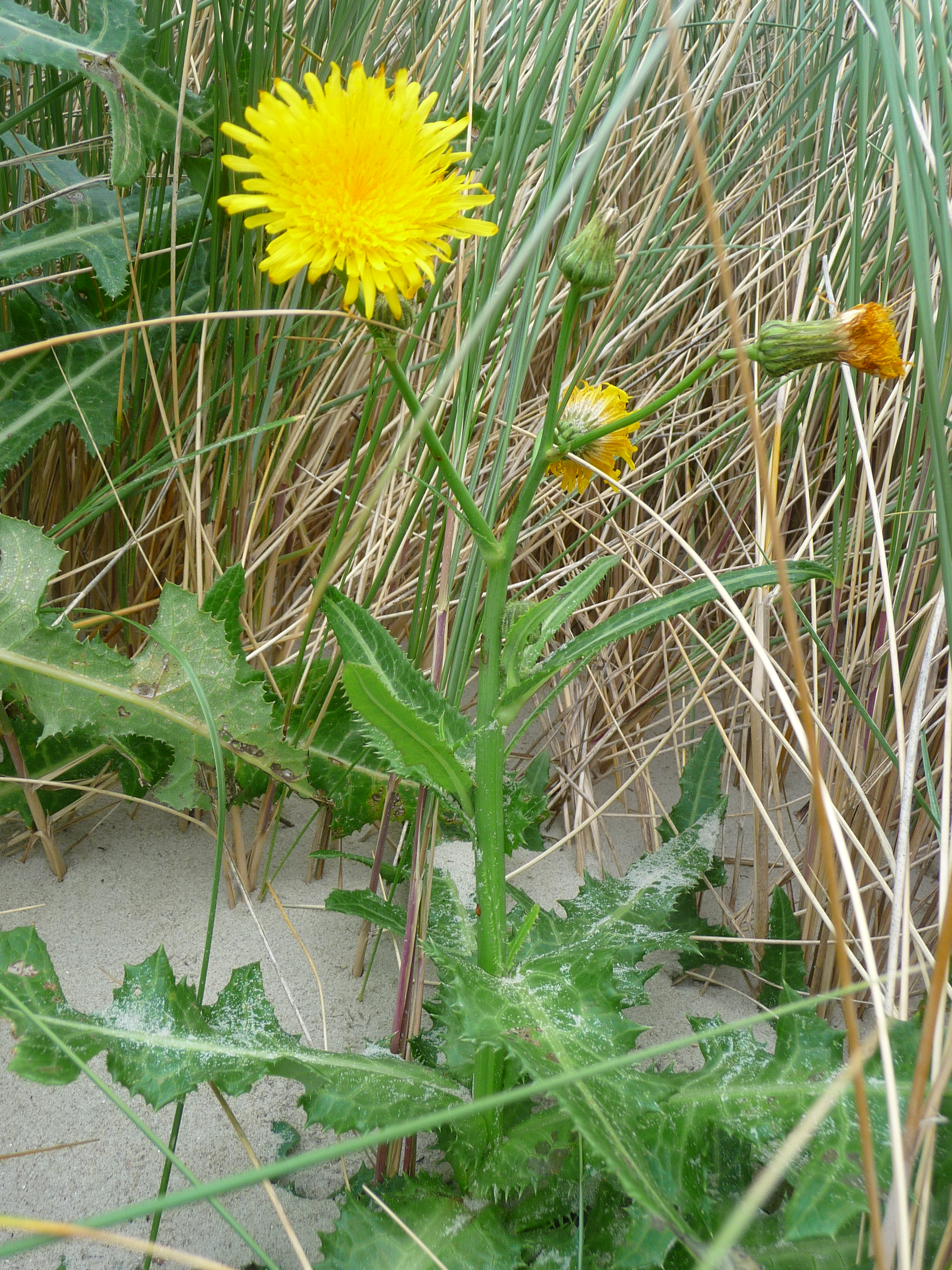 Acker-Gänsedistel (Sonchus arvensis), fotografiert auf der ostfriesischen Nordseeinsel Juist (Niedersachsen, Deutschland)